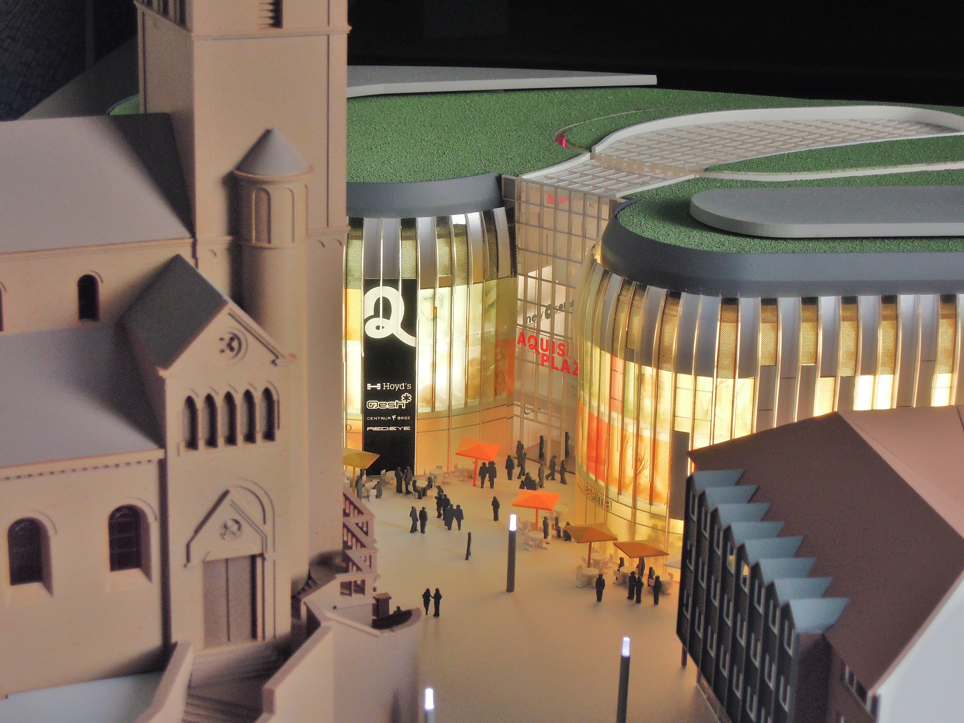 Am Kaiserplatz in Aachen entsteht das Einkaufszentrum "Aquis Plaza". Ein Blick auf die Baustelle im Januar 2015.